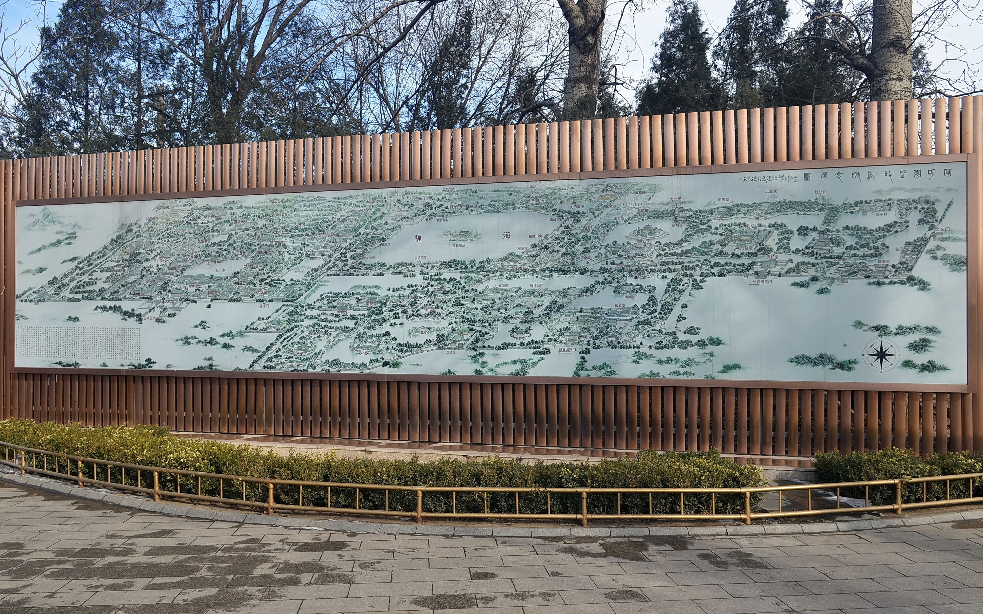 圆明三园（圆明园、长春园、绮春园）历史盛时鸟瞰全景图